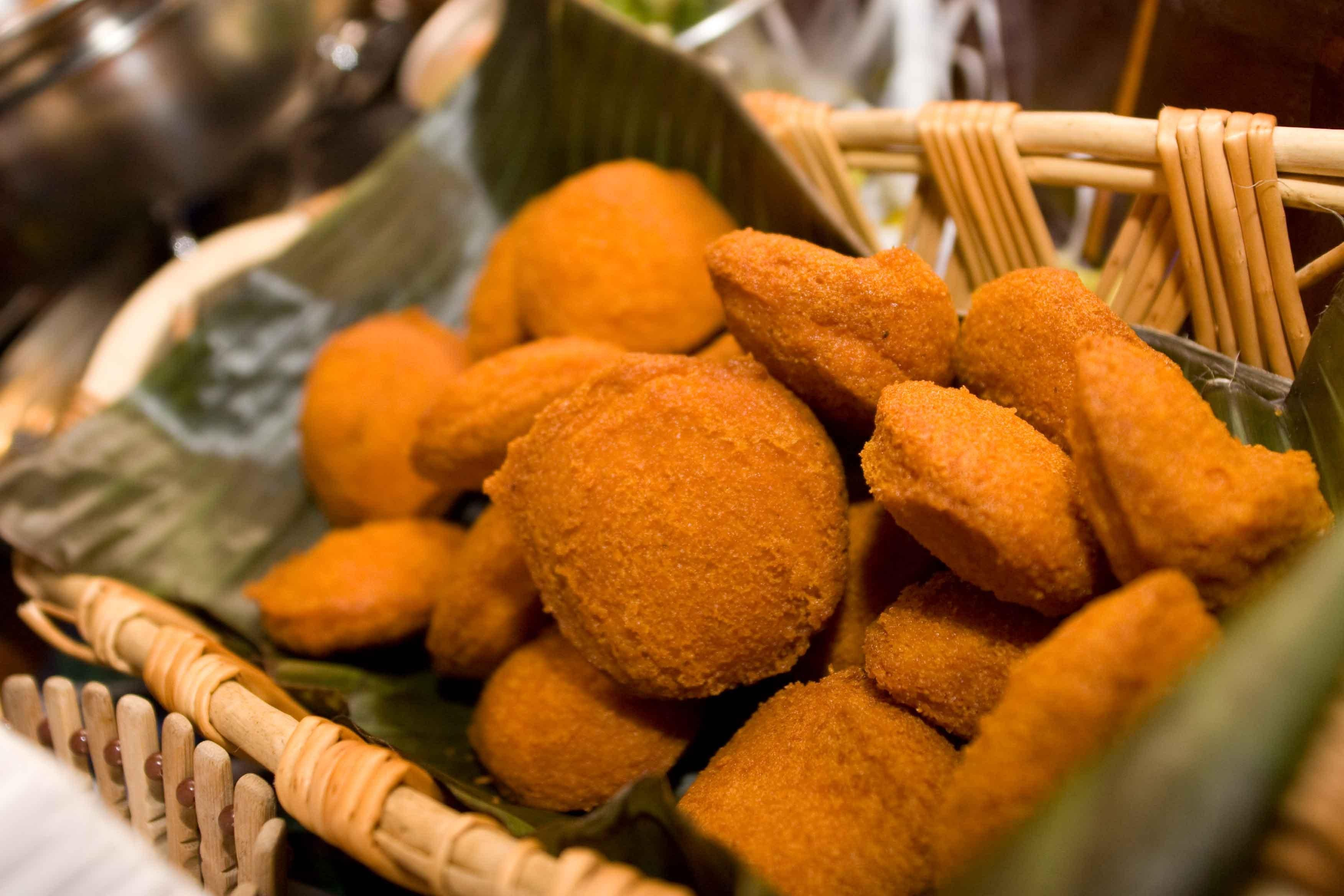 Baiana Claudia - Quitute Elaborado pelas Afro-descendentes - Baianas de Acarajé.